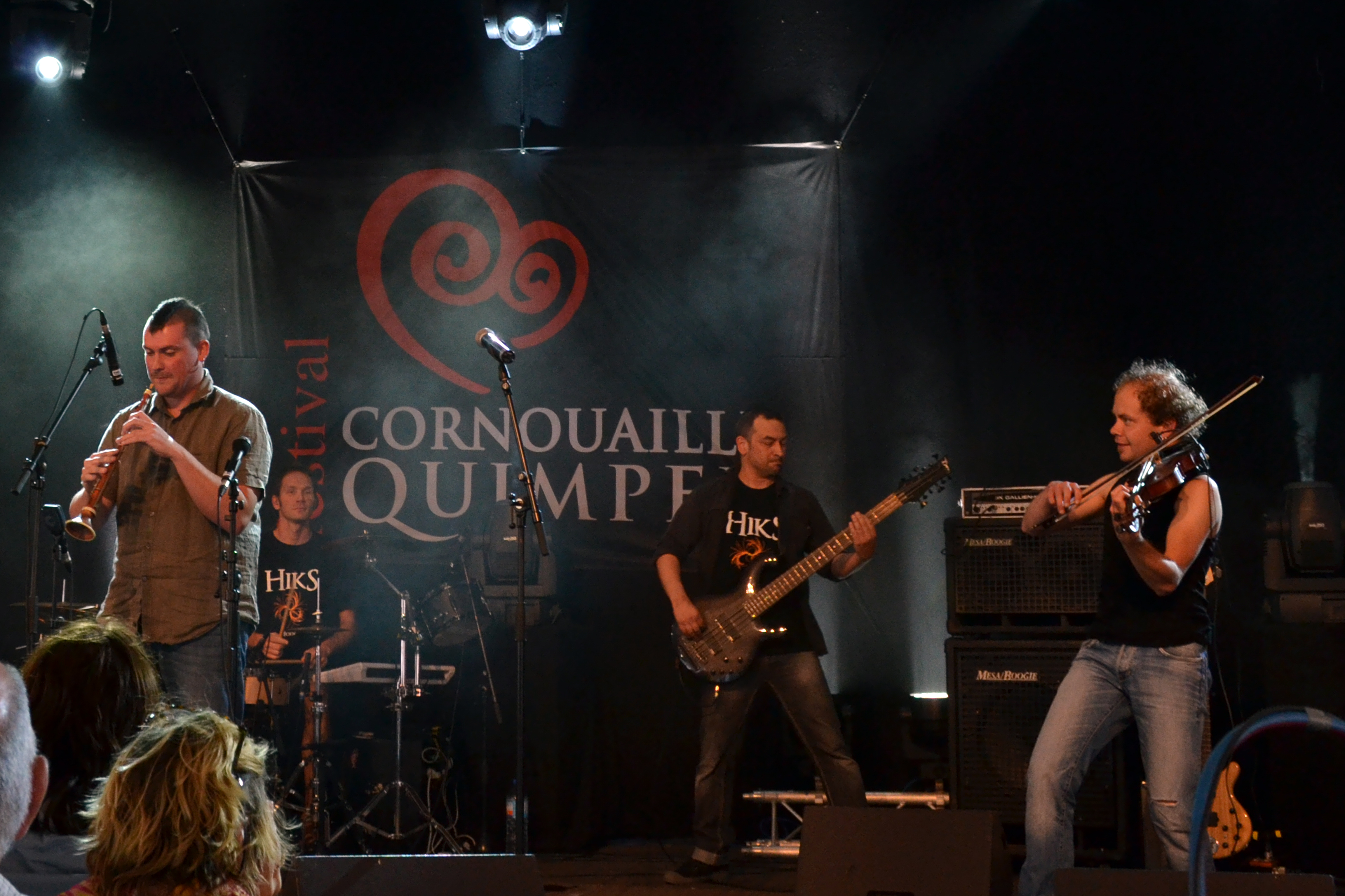 Le groupe Hiks au 15e Cyber Fest-Noz, diffusé par An Tour Tan, le dimanche 28 juillet 2013 lors du festival de Cornouaille place Saint-Corentin à Quimper.